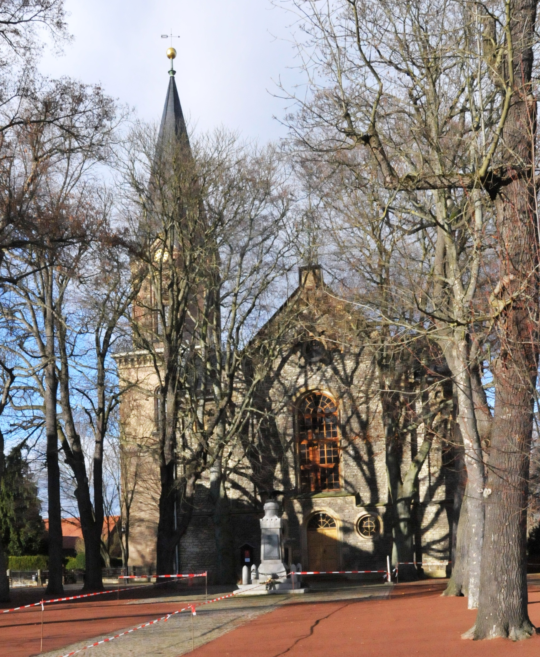 Emleben, Kirche